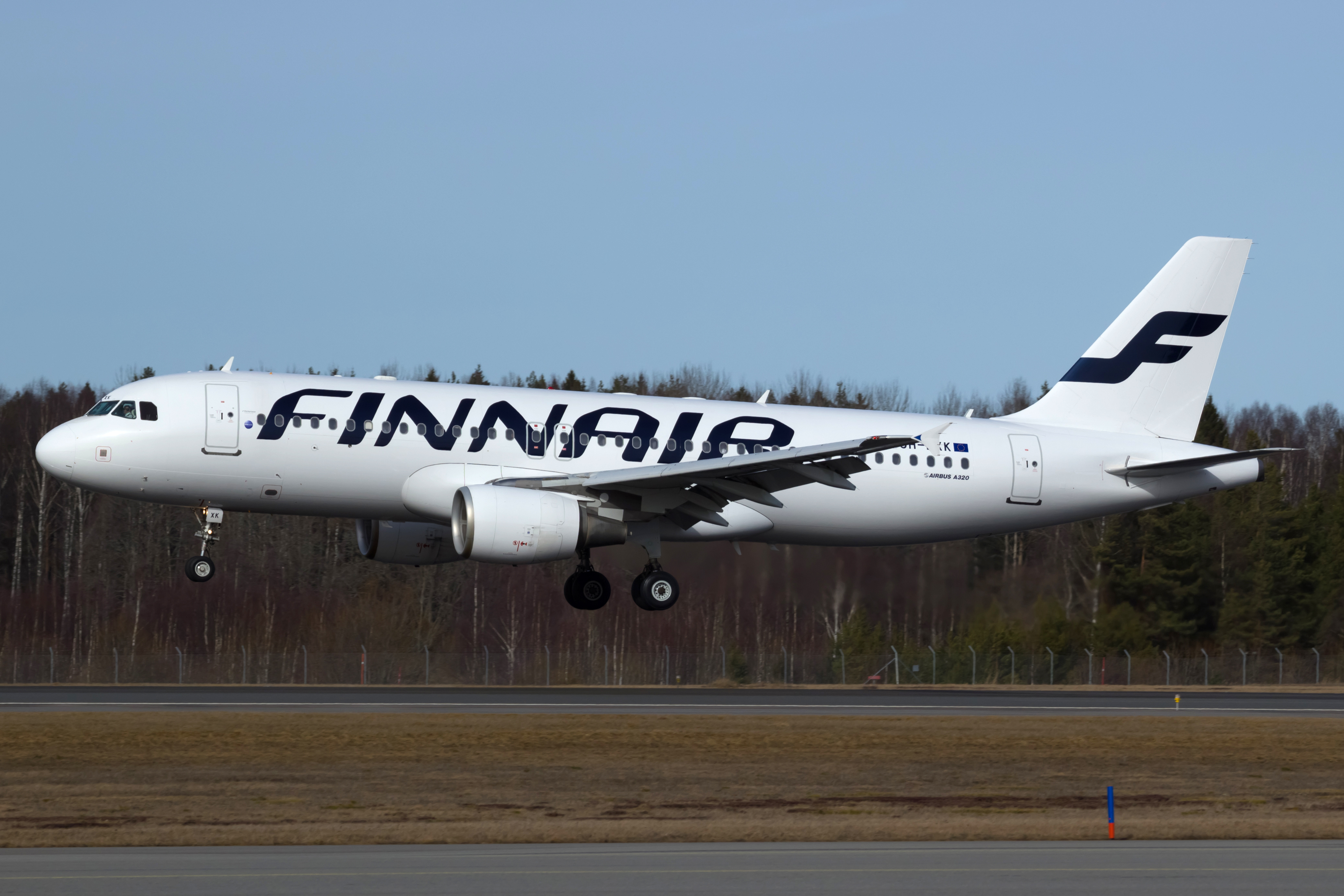 Airbus A320 de Finnair aterrando no aeroporto de Estocolmo-Arlanda.